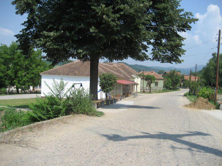 Toljevac, centar sela